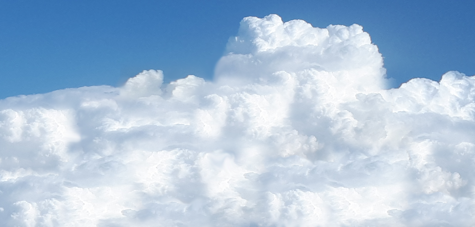 ابر کومولوس در همدان